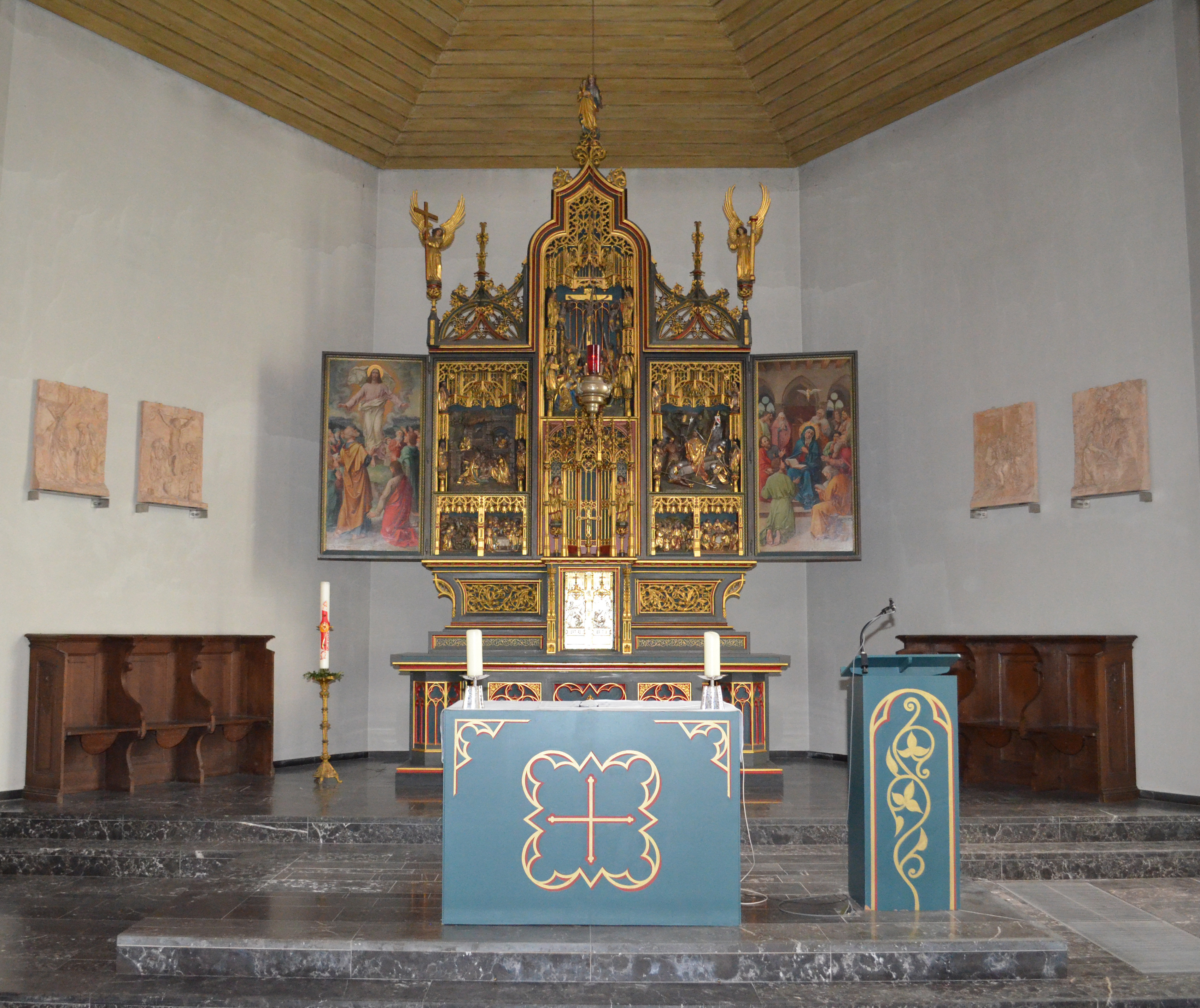 Altar in der Marienkapelle in Aachen-Burtscheid